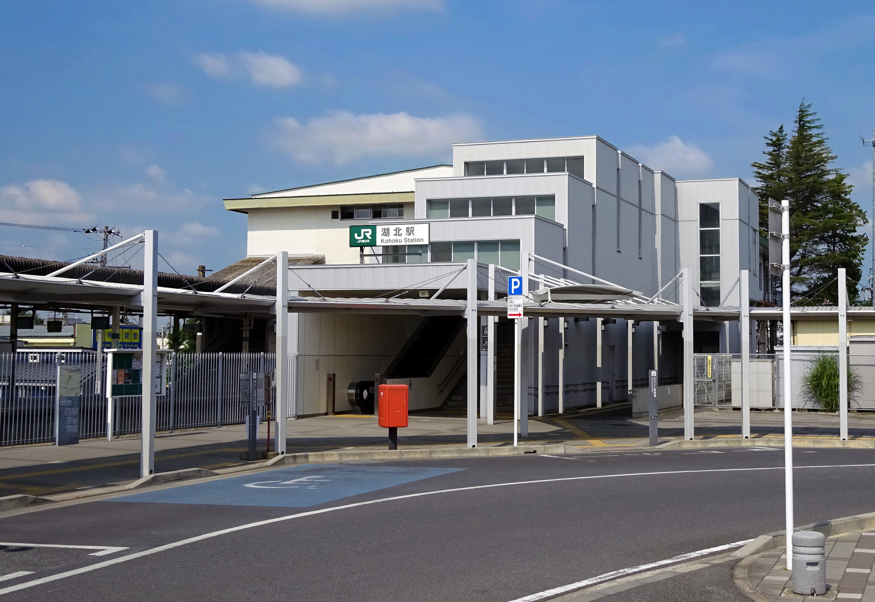 湖北駅北口(cropped)